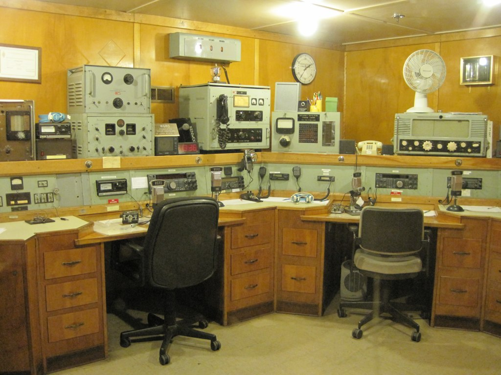 Radio tranmitter room